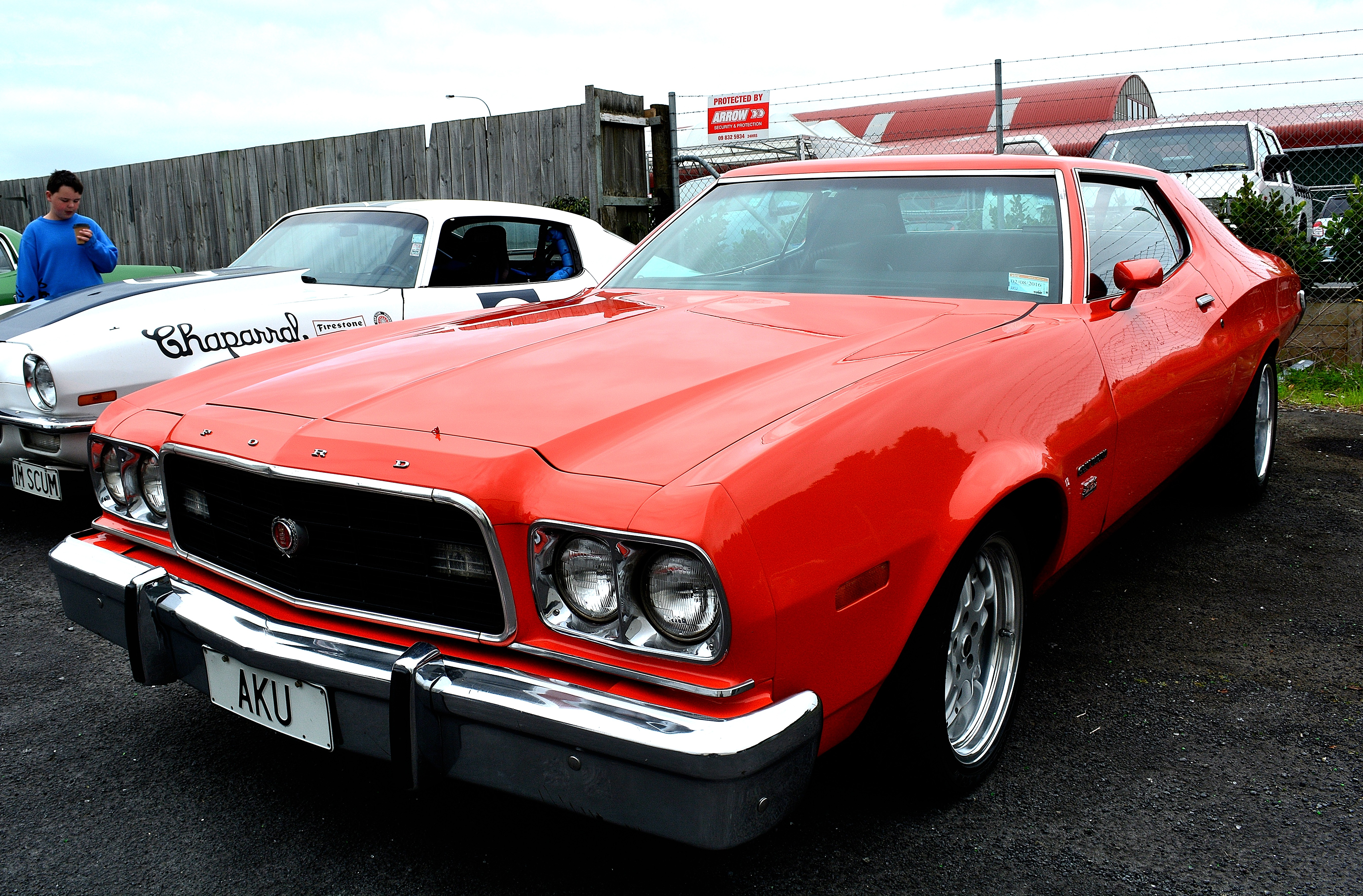 Henderson, Auckland, New Zealand